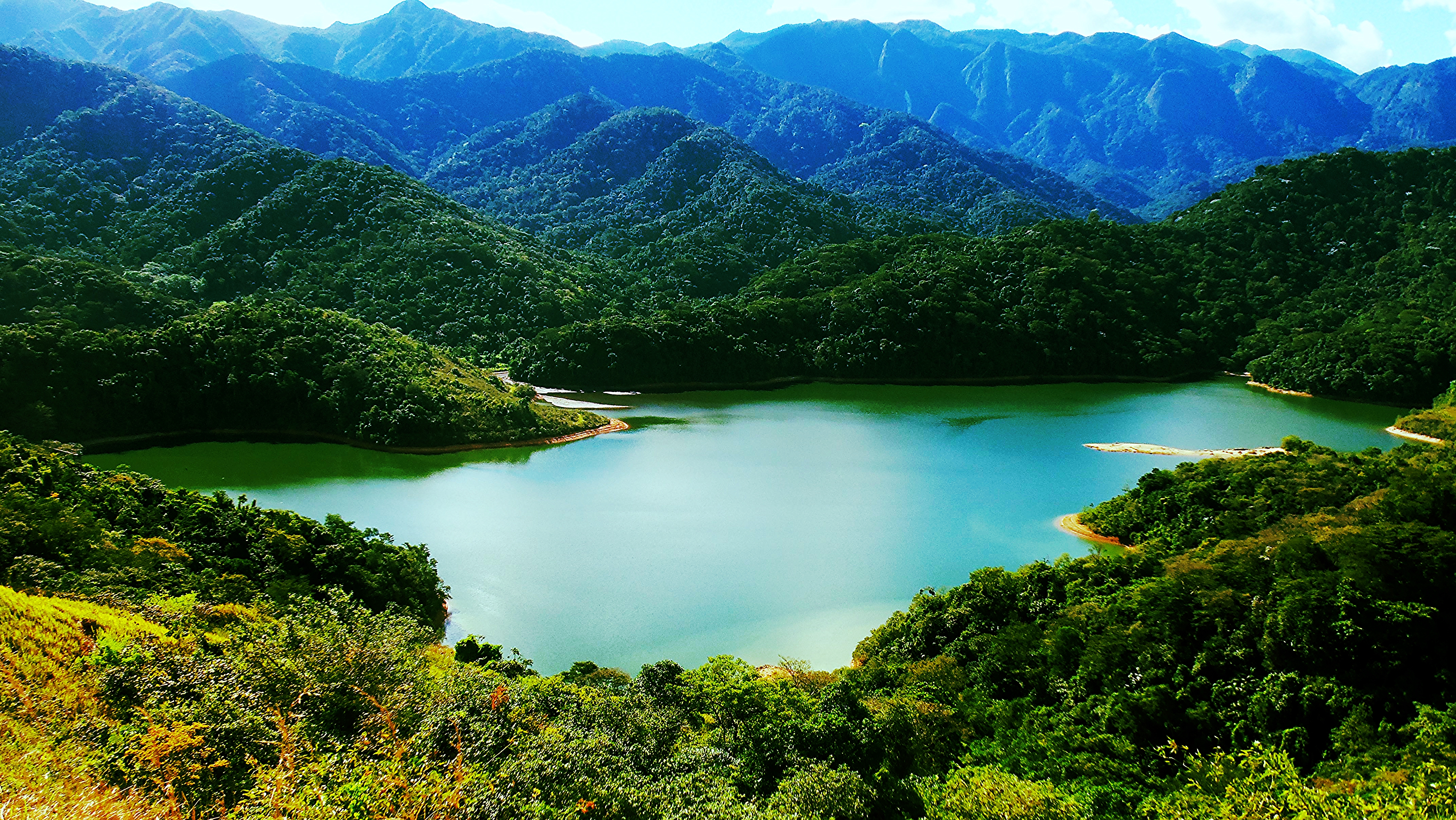 Represa pertencente à Petrobras, com acesso limitado. Visível na descida da Serra de Petrópolis.